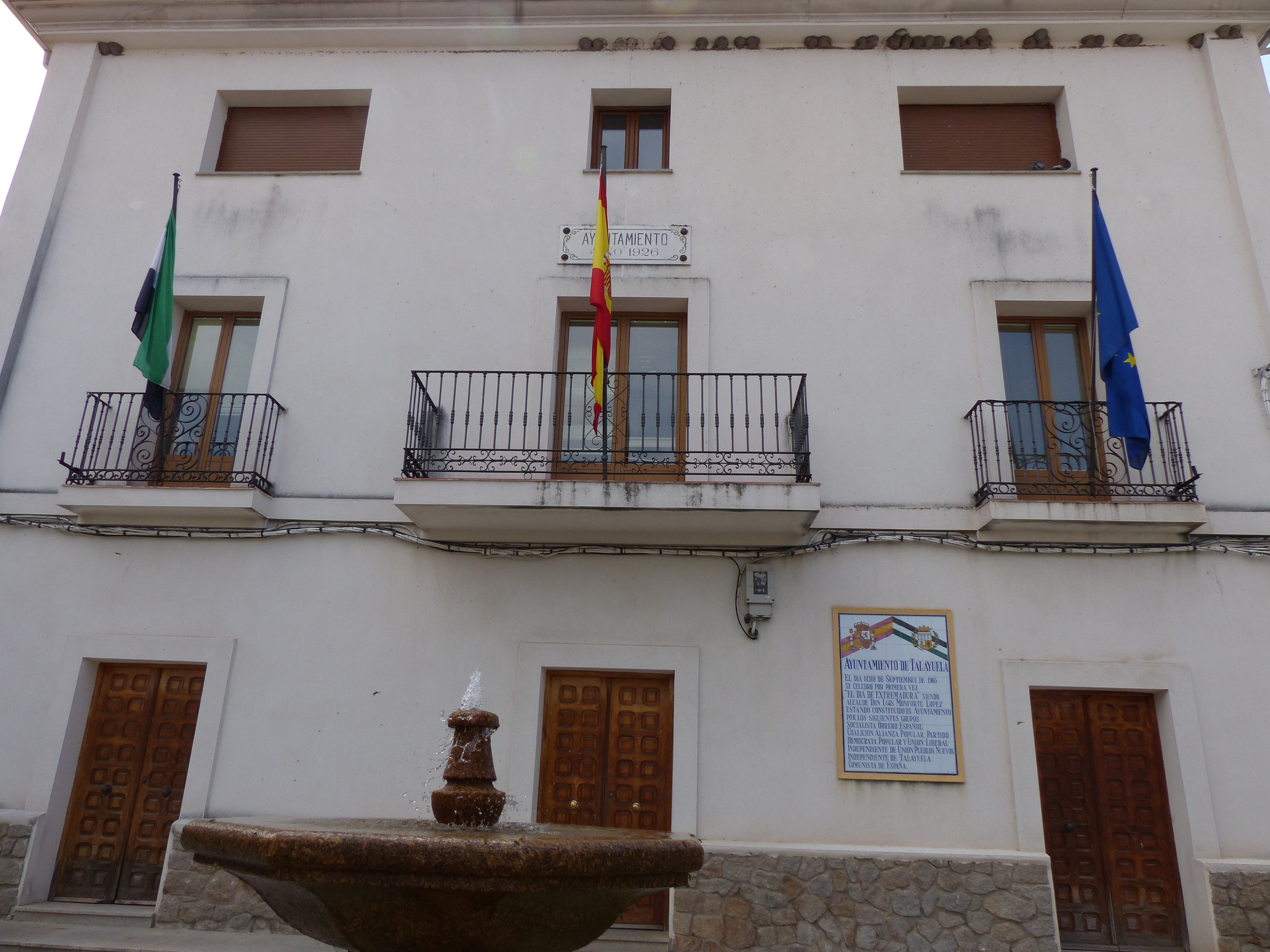 Talayuela, Cáceres, Ayuntamiento